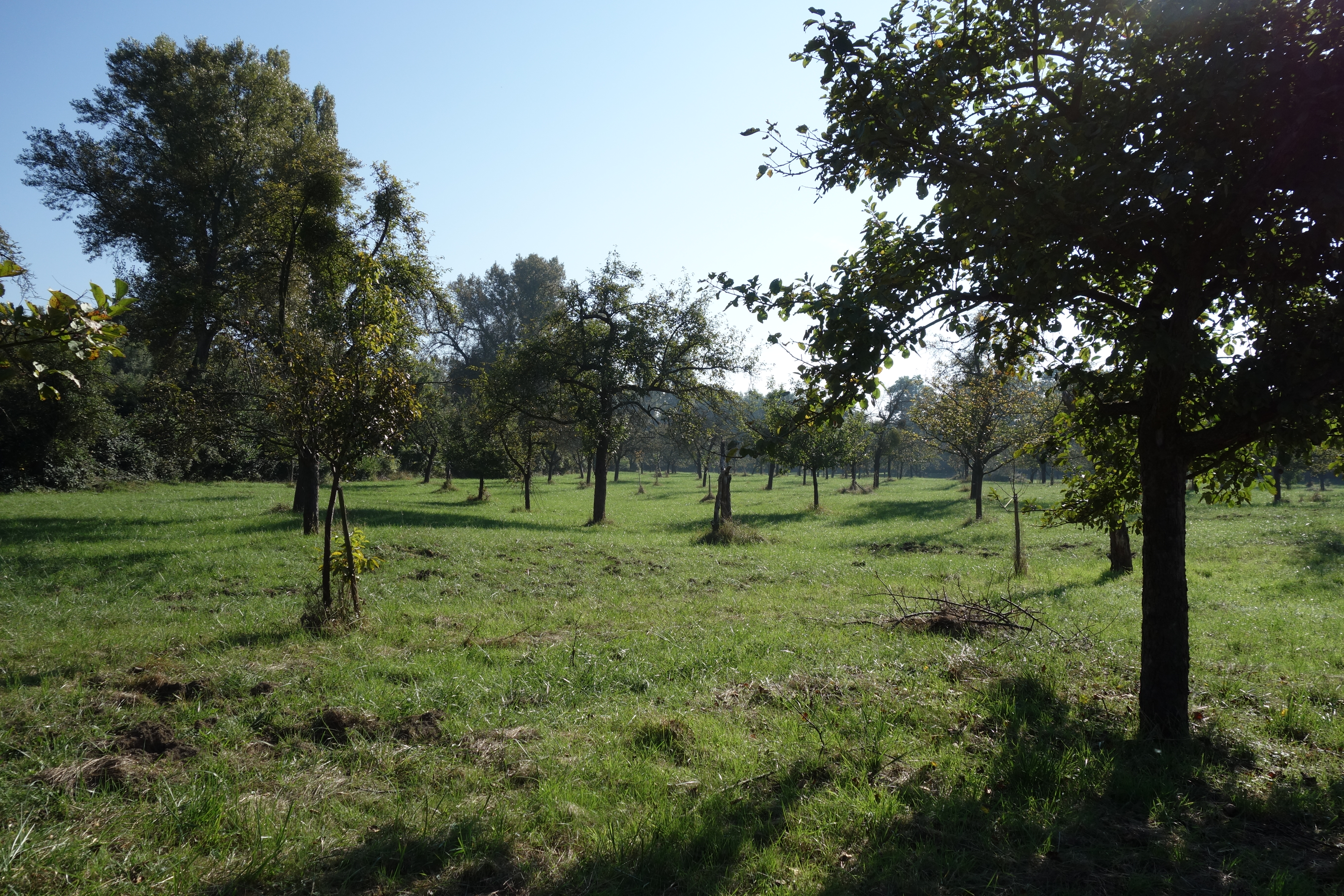 (NSG:BW-2.012)_Reißinsel, Deutschland, Baden-Württemberg, Mannheim, Rhein, Streuobstwiese im Naturschutzgebiet Reissinsel